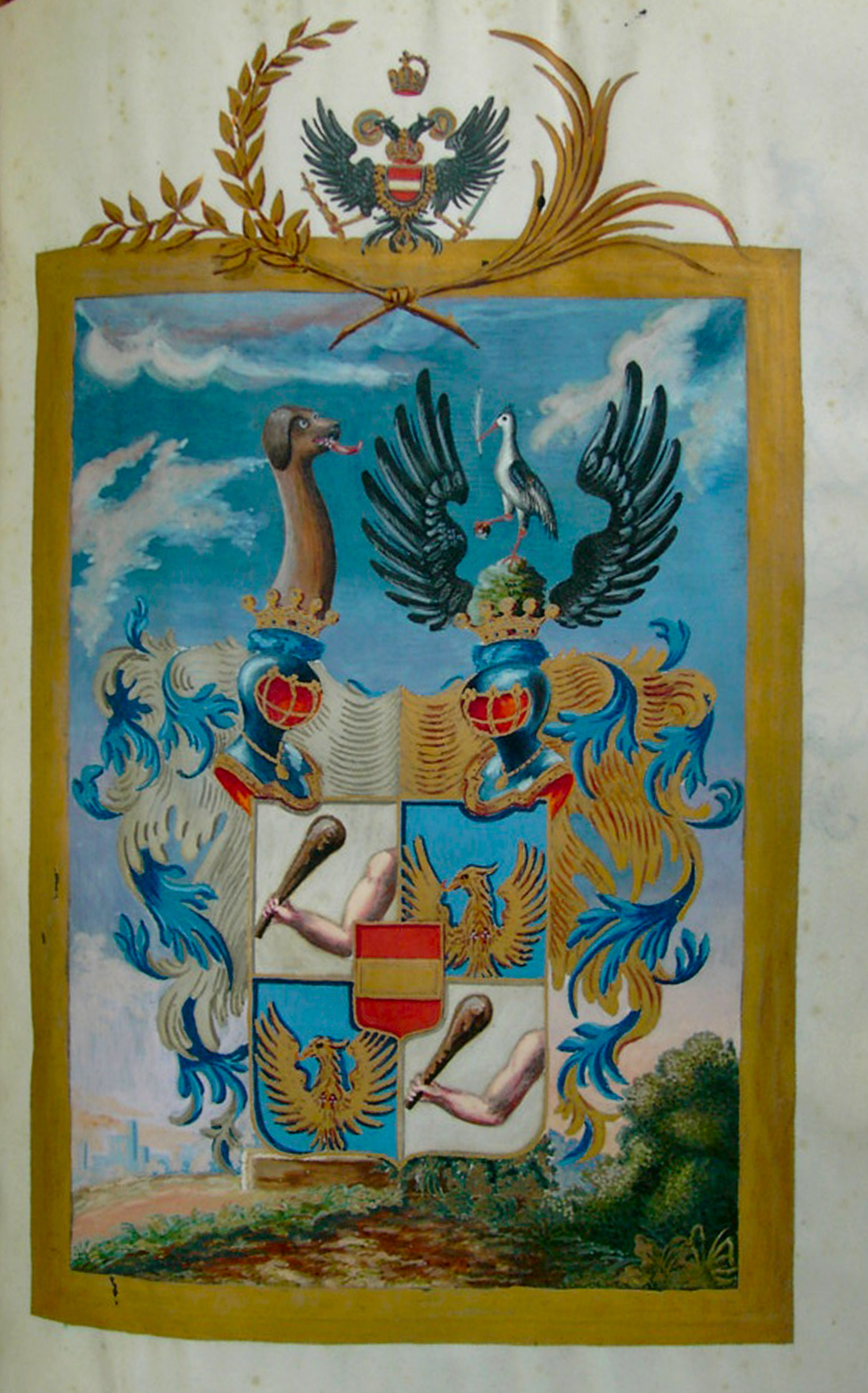 Wappen aus dem Diplom von Franz II./I. (römisch-deutscher Kaiser 1792-1806, Kaiser von Österreich 1804-1835) für Carl Anton Krafft von Festenberg auf Frohnberg (1743-1830) über dessen Erhebung in den Reichsfreiherrenstand (d.h. römisch-deutschen Freiherrenstand). Ausgestellt Wien, 21. August 1805, mit eigenhändiger Unterschrift des Kaisers. Farbige Wappenzeichnung auf Pergament.